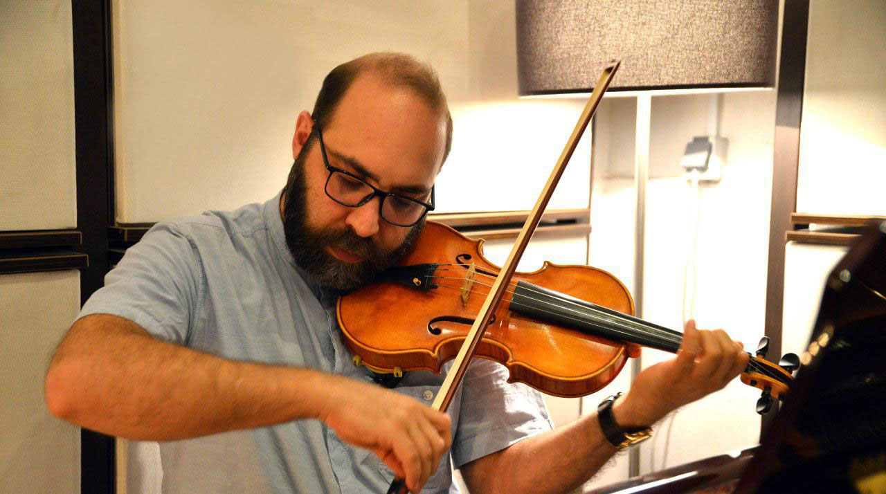 علی جعفری پویان نوازنده و مدرس ویلن